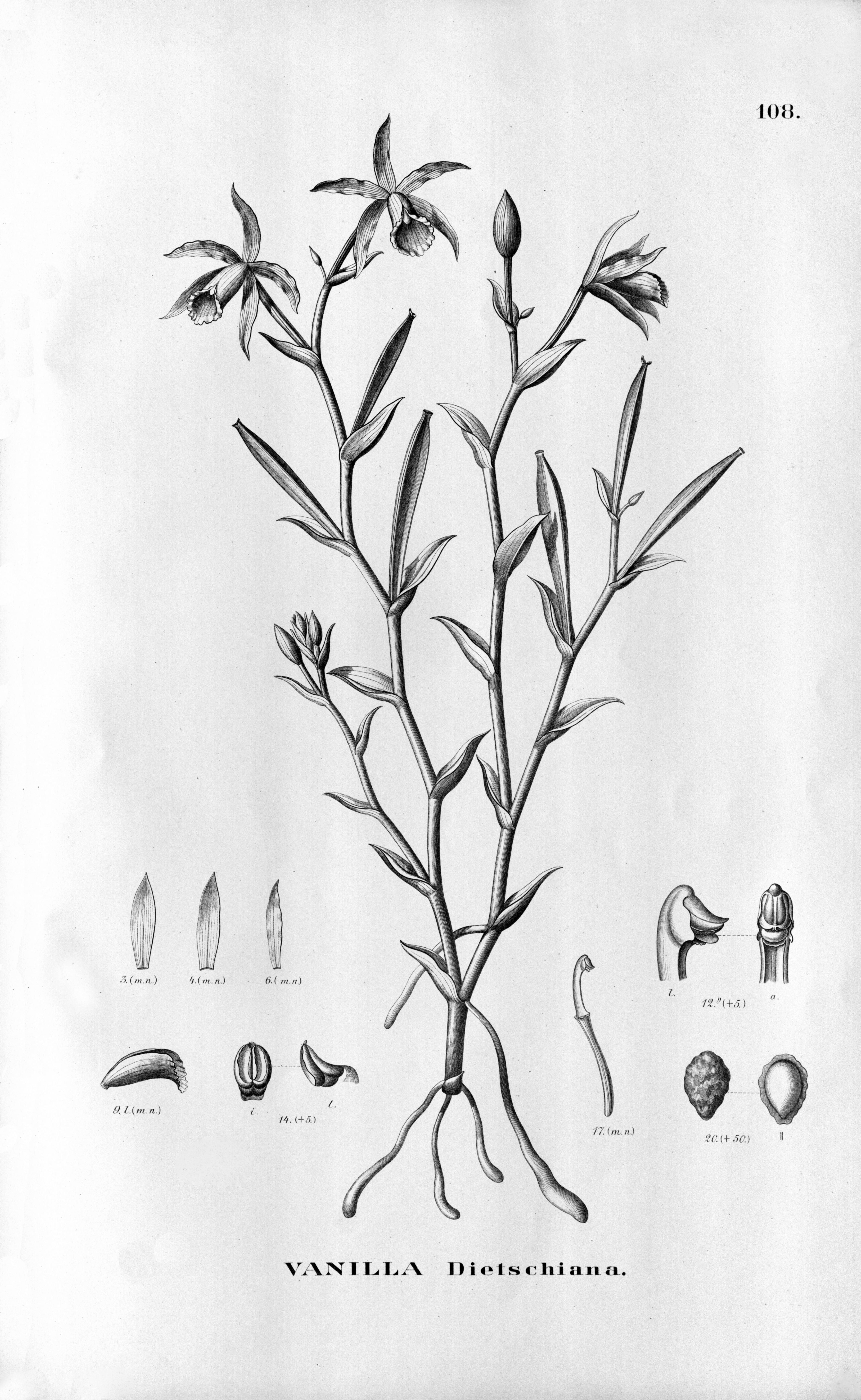 Illustration of :Vanilla dietschiana